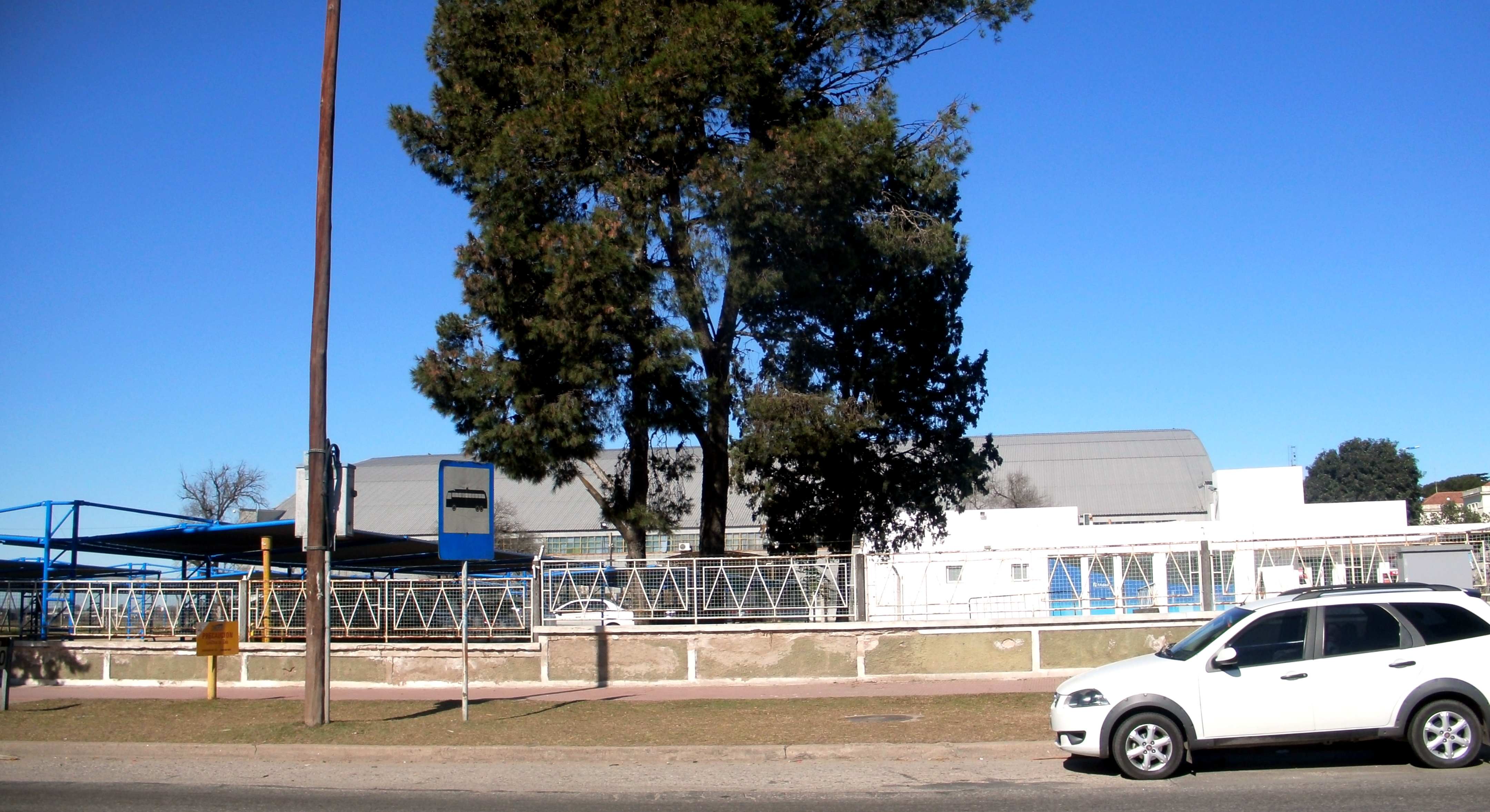 Vista de FADEA desde la ruta